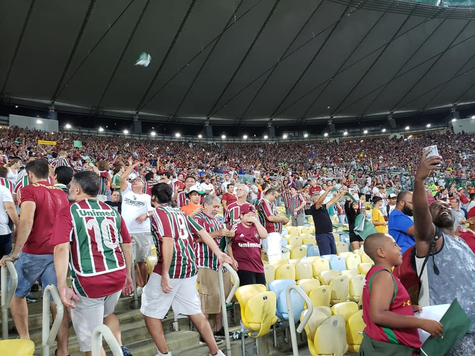 Torcida do Fluminense contra o Atlético-PR em 28/11/2018 em partida pela Copa Sul-Americana.